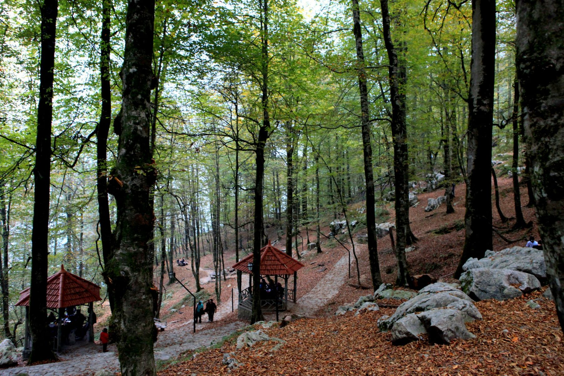 Namak Abrood, Mazandaran